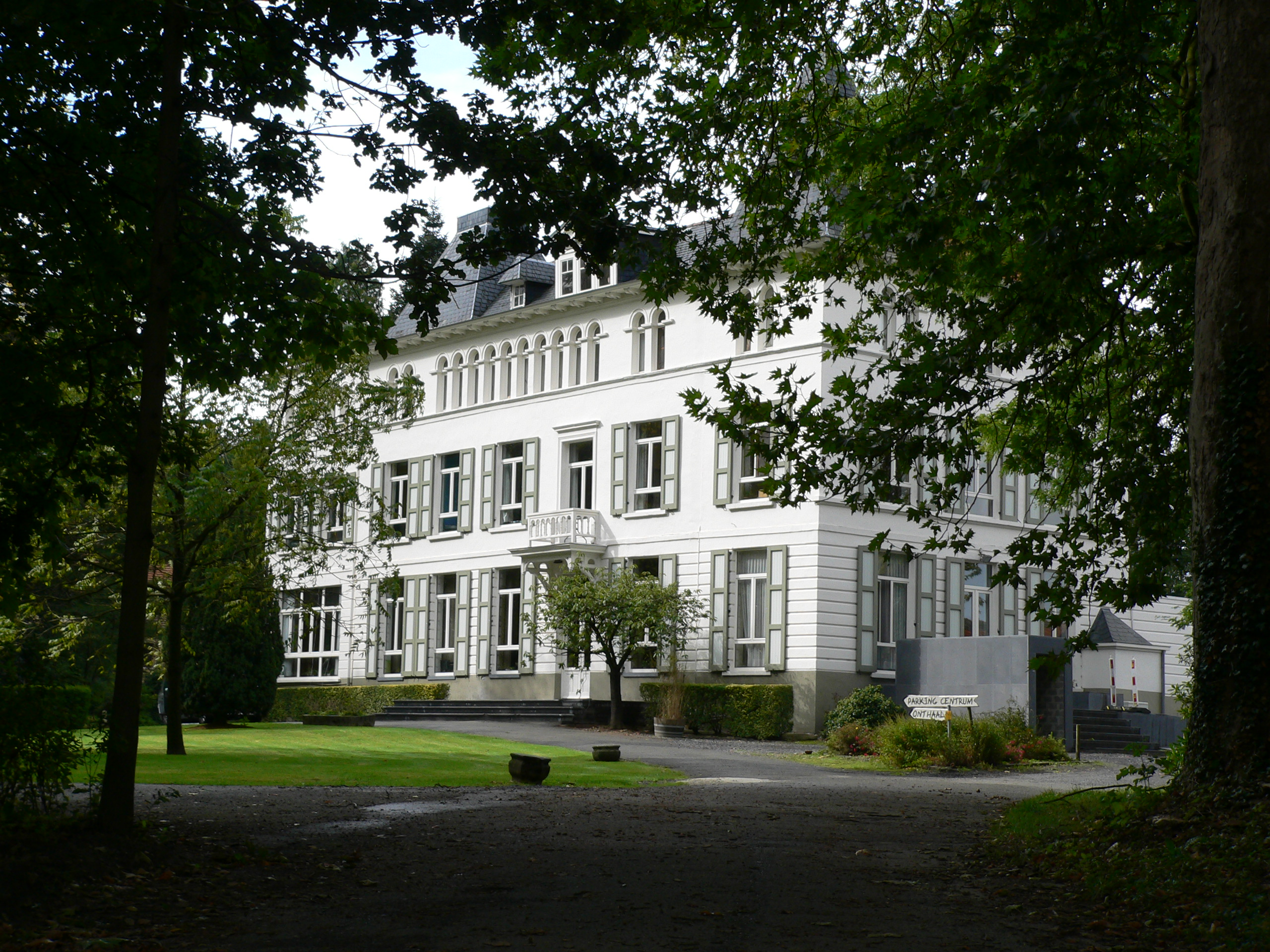 Kasteel Ter Loo langs de Torhoutsesteenweg. Vanaf 1550 eigendom van één familie, en vergroot in 1843. In 1946 omgevormd tot bezinningscentrum.